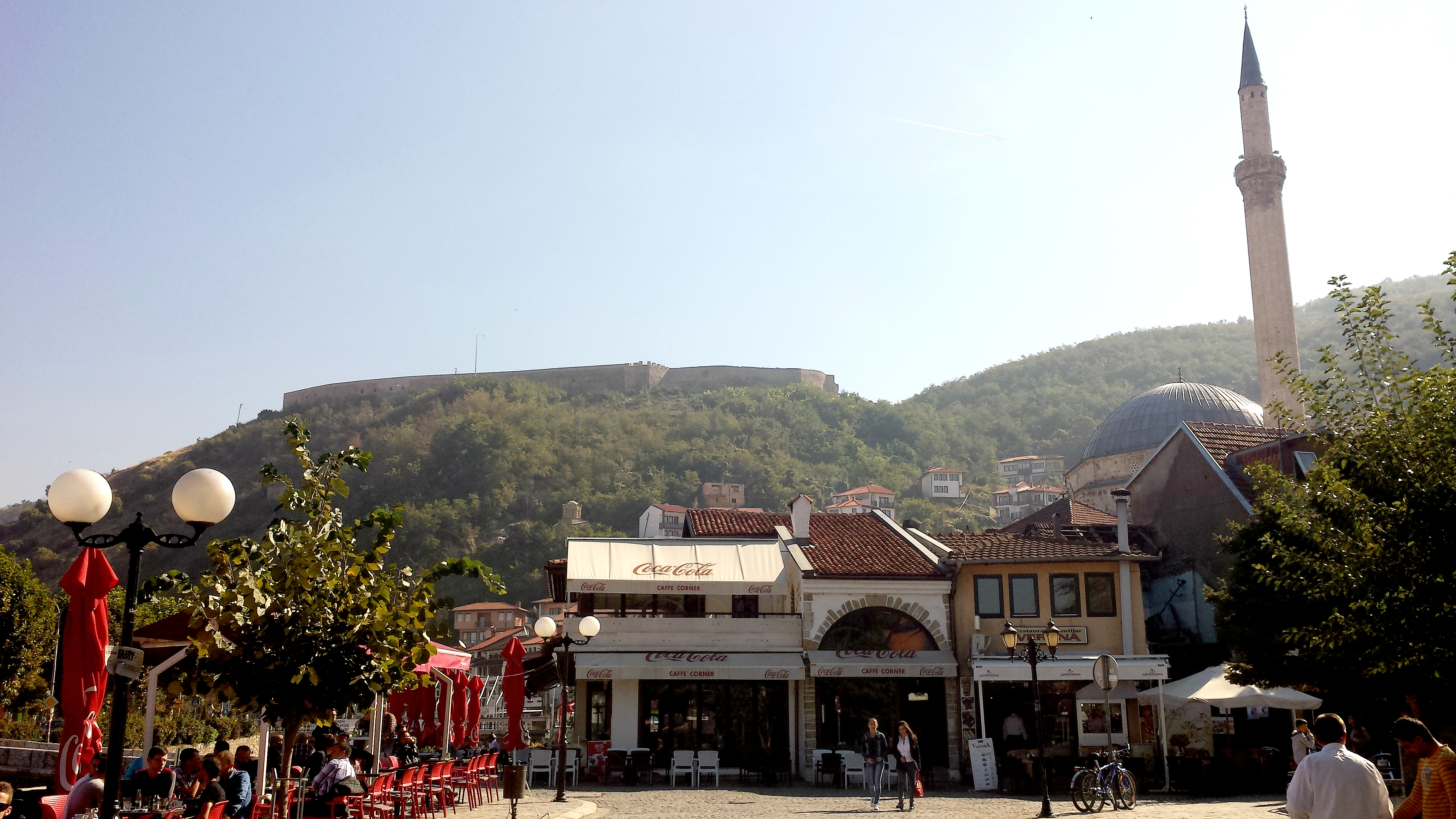 Qendra historike e Prizrenit